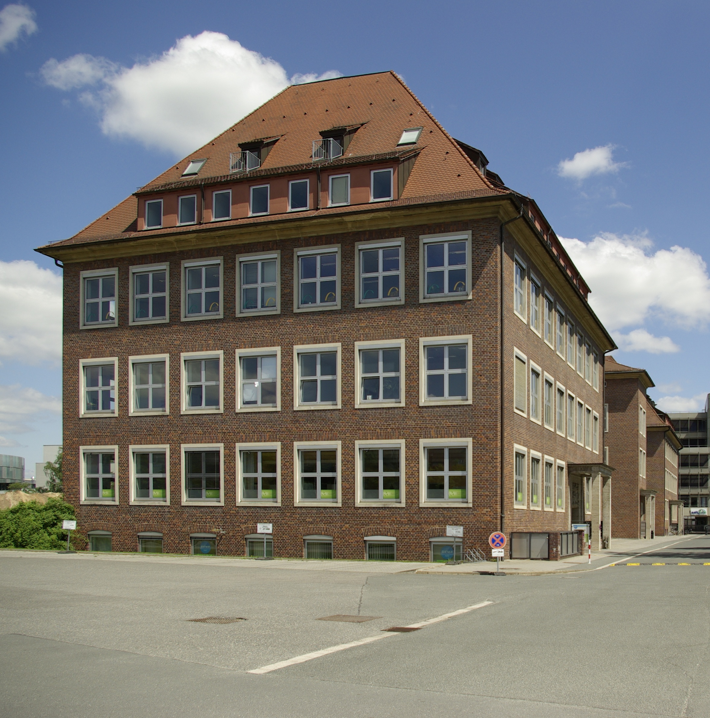 Ehemaliges Hauptgebäude der Paul Gossen GmbH in Erlangen